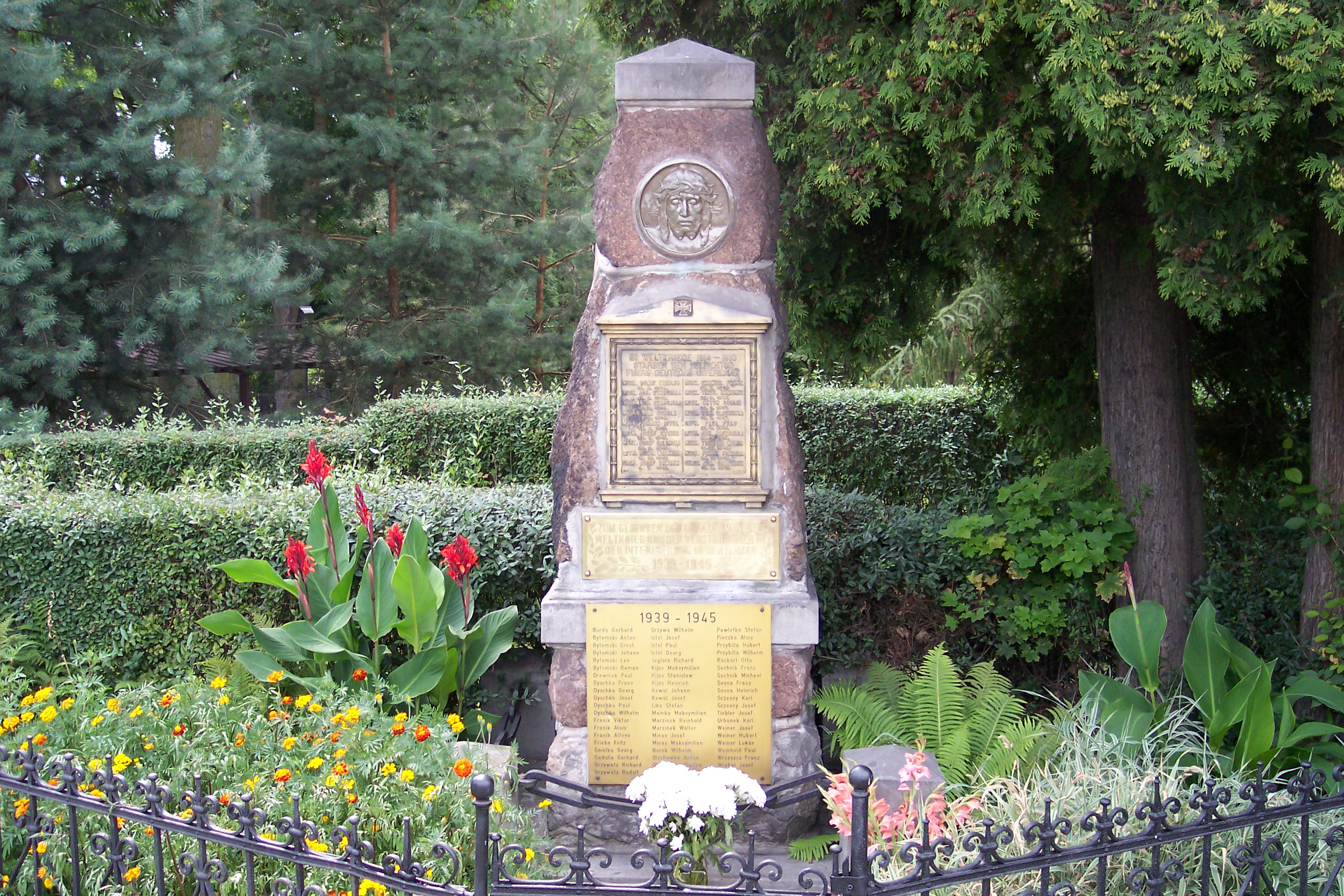 Kościół Świętej Trójcy w Rachowicach